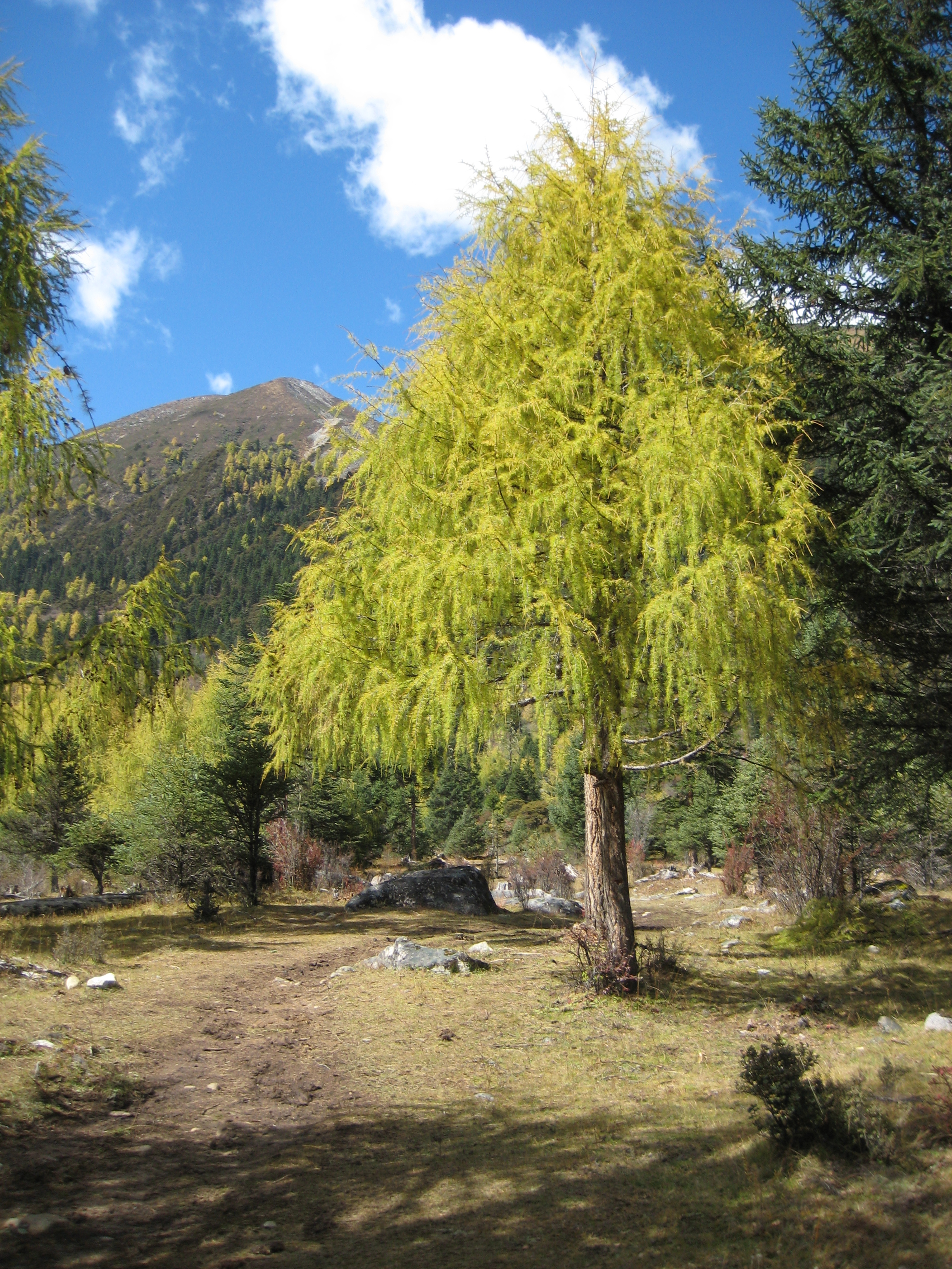 Larix potaninii (centre) and Picea balfouriana (right edge), Ganzi Zangzu, Huluhai 葫芦海, Sichuan 四川, China.